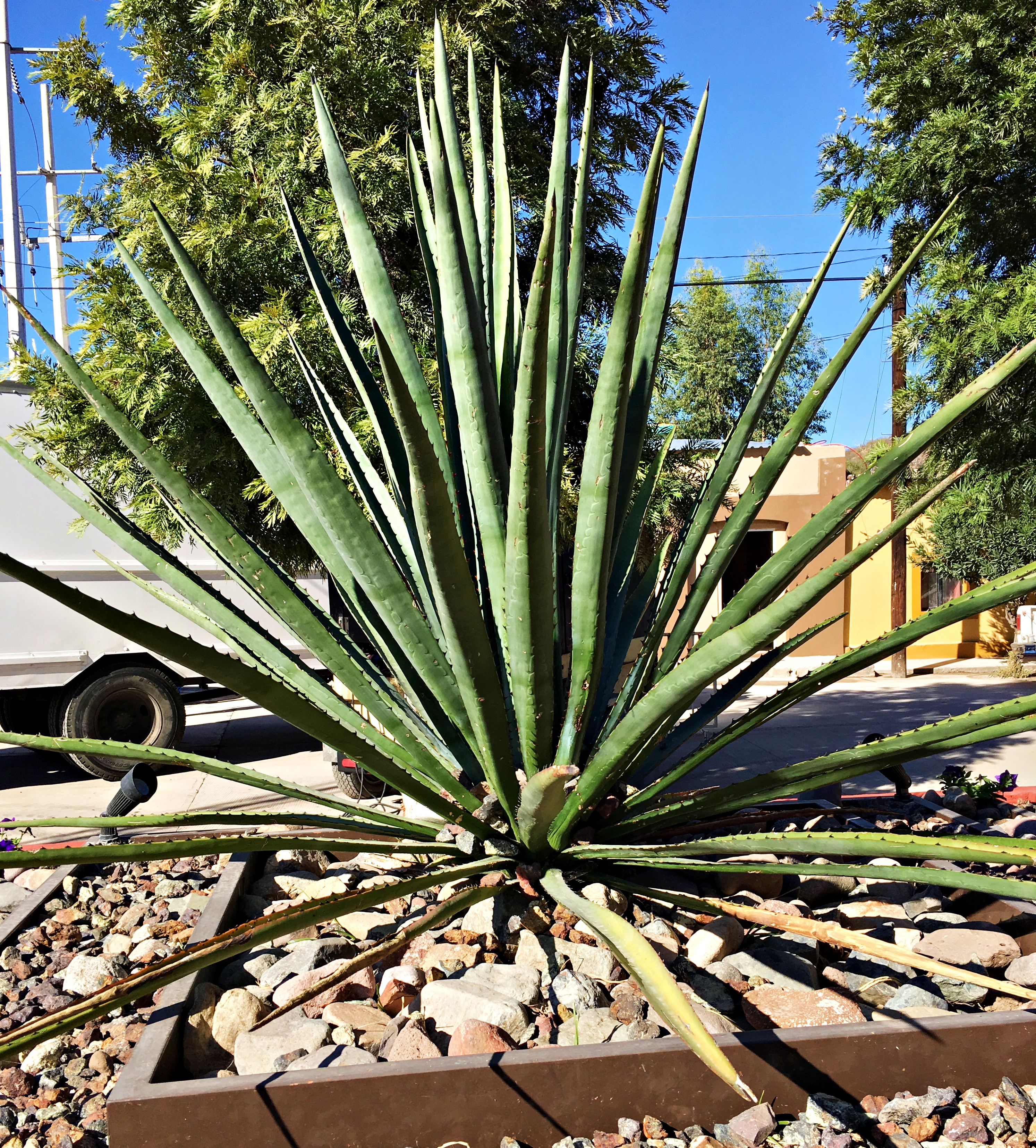 Agave Angustifolia Haw localizado en el municipio de Bacanora, Sonora, México.